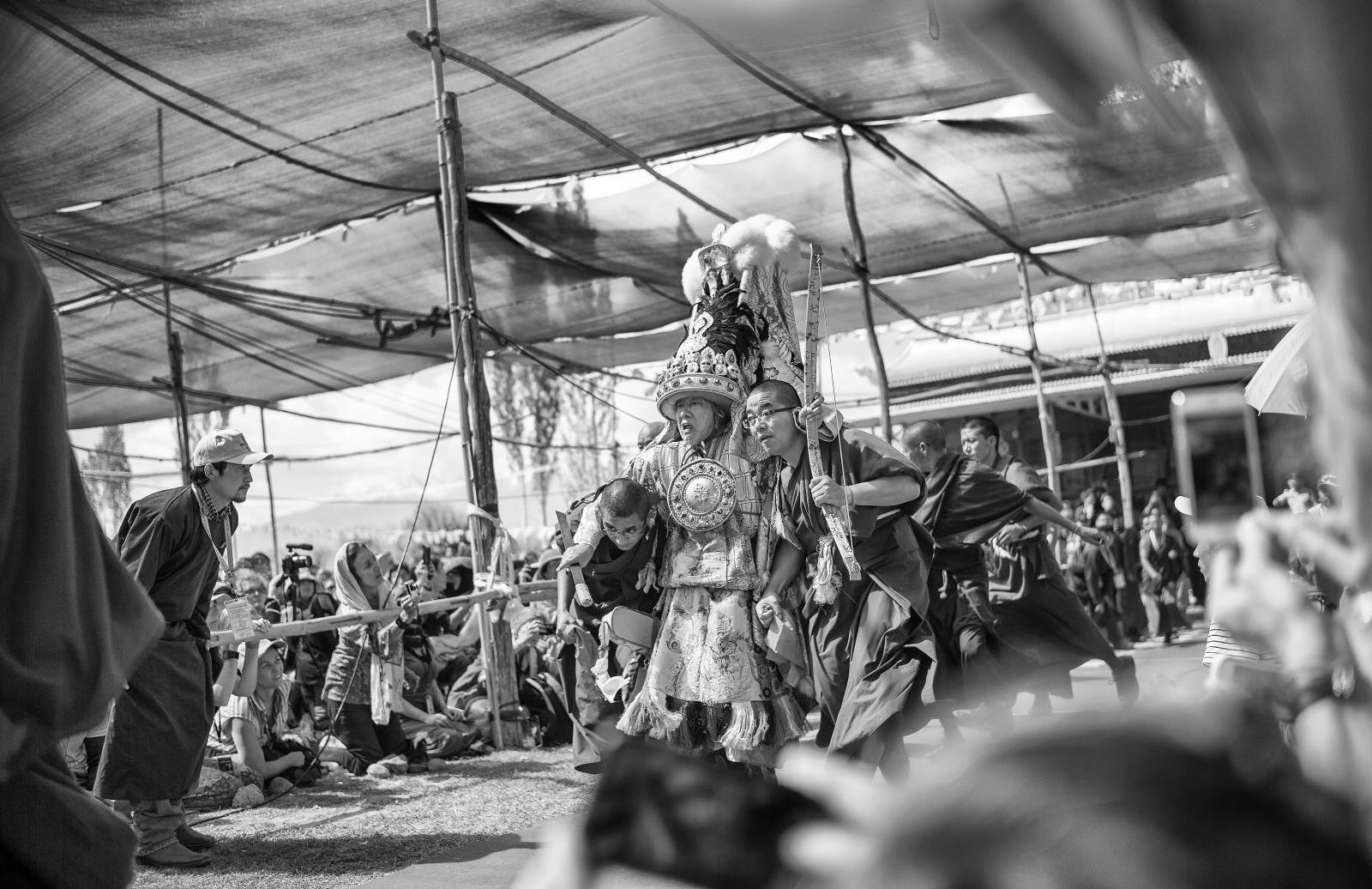 Ladakh